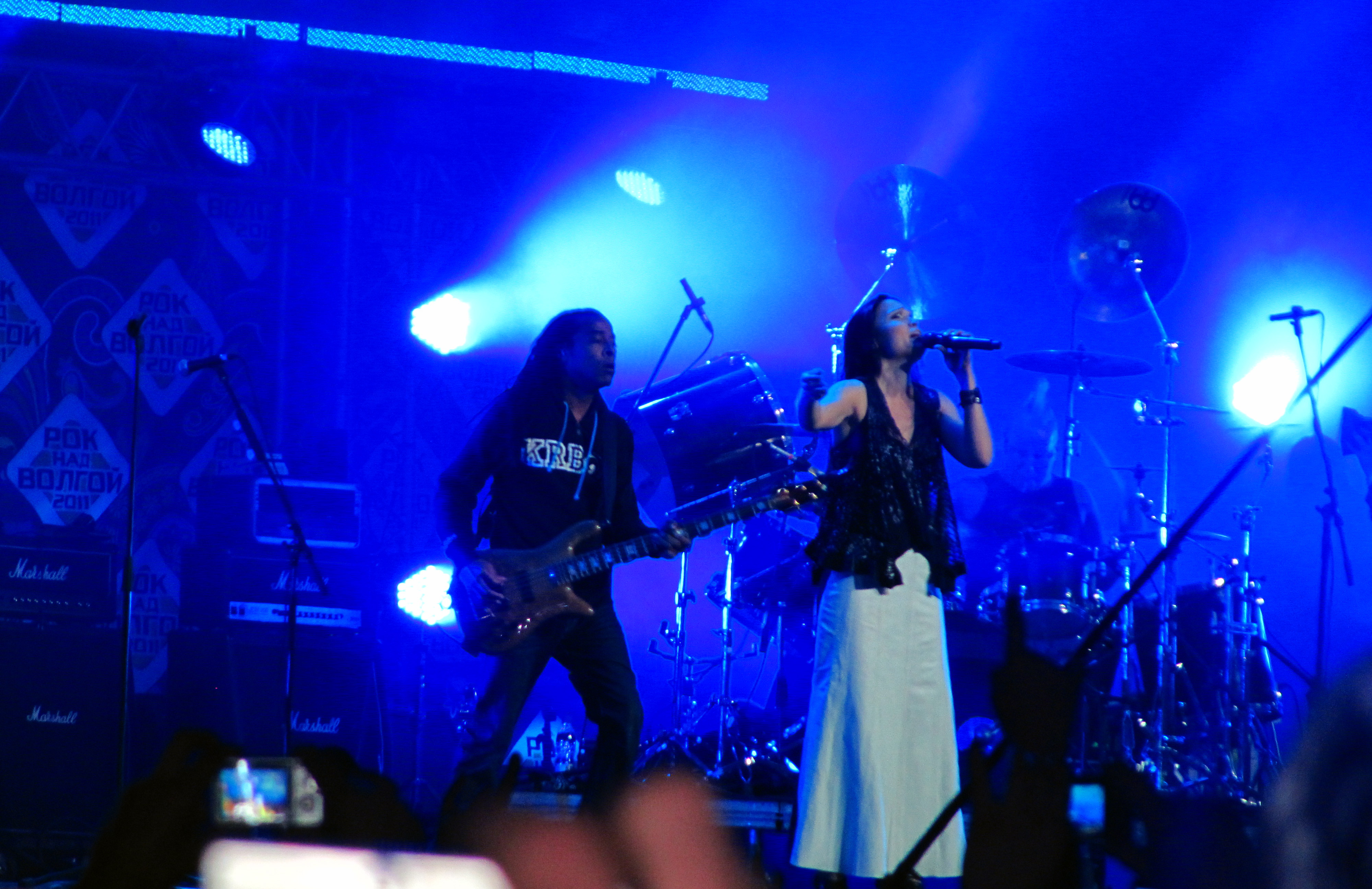 Выступление Tarja Turunen на фестивале Рок над Волгой 2011